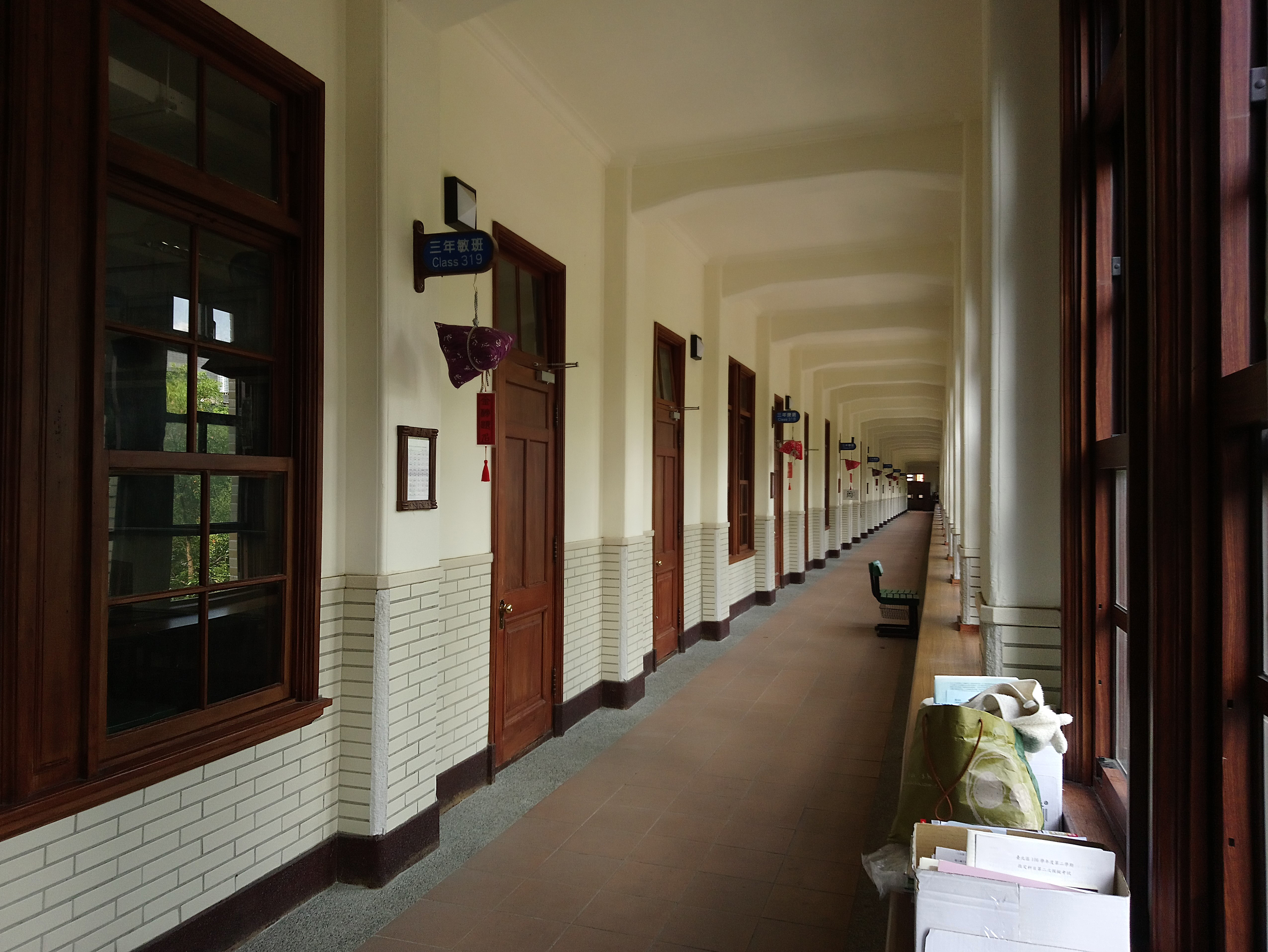 臺北市立中山女子高級中學逸仙樓二樓走廊,臺北市中山區朱厝崙次分區力行里